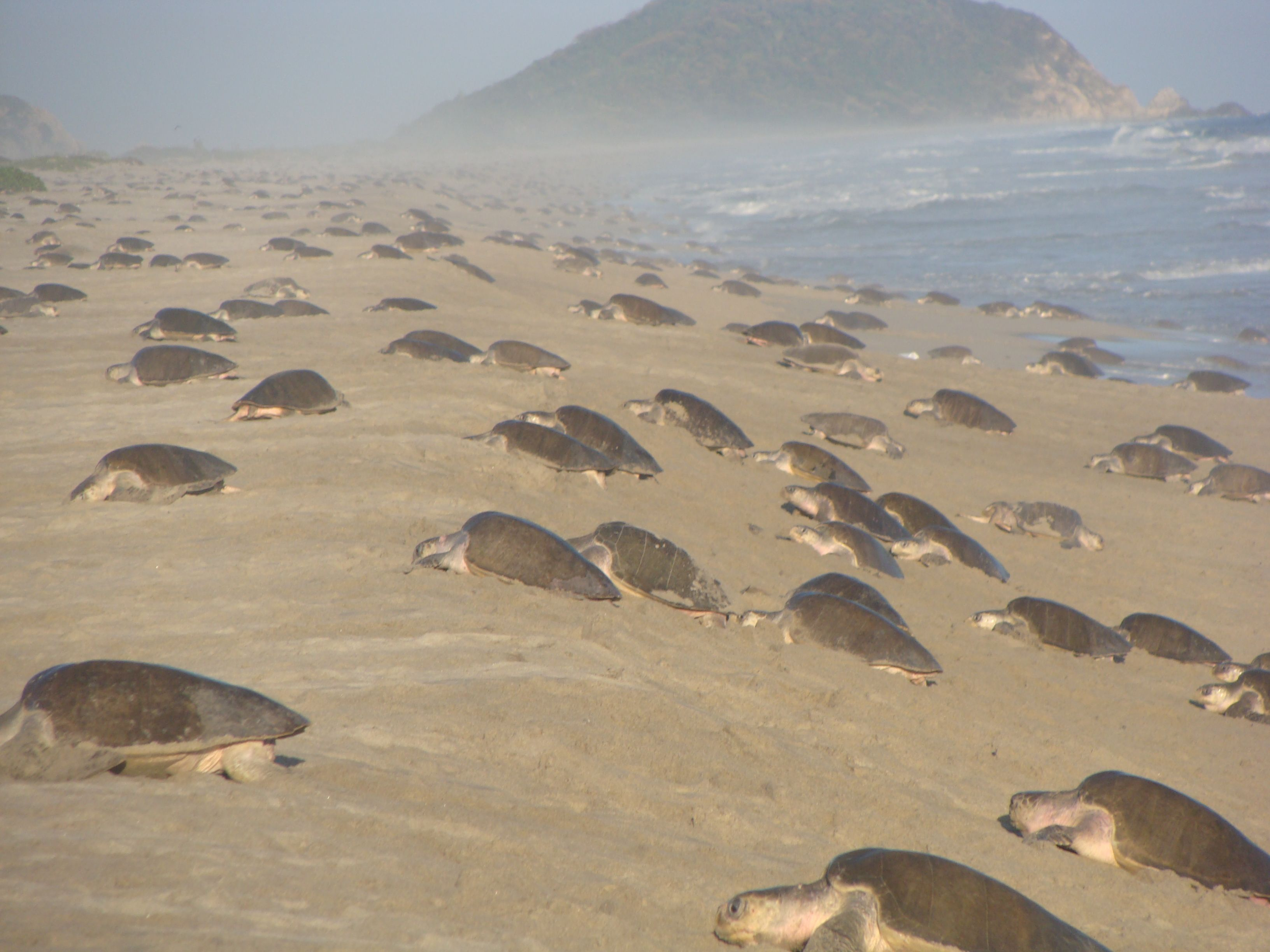 Arribada de tortugas golfinas, Oaxaca Mexico